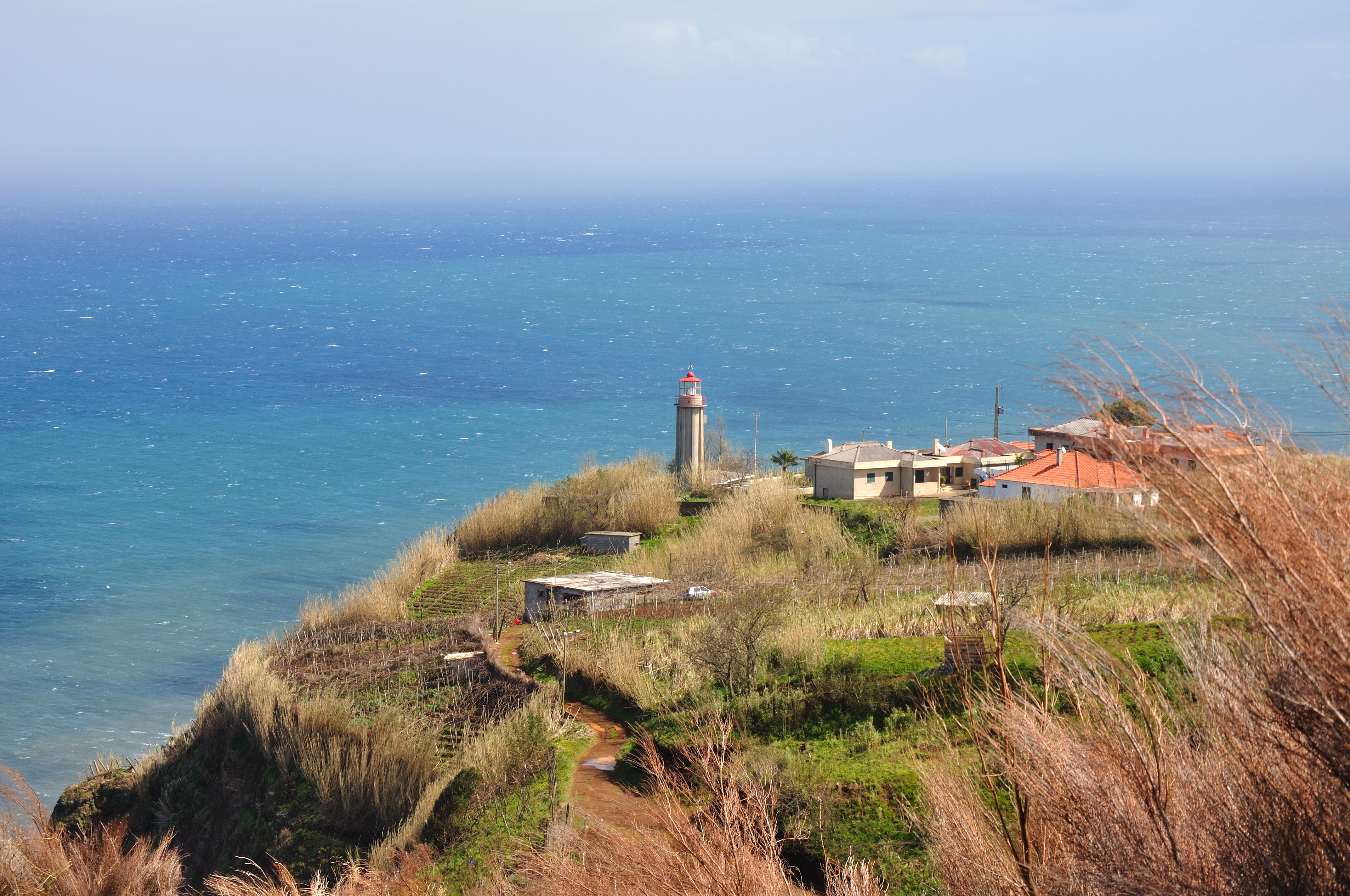 Portugal, Madeira, views in São Jorge